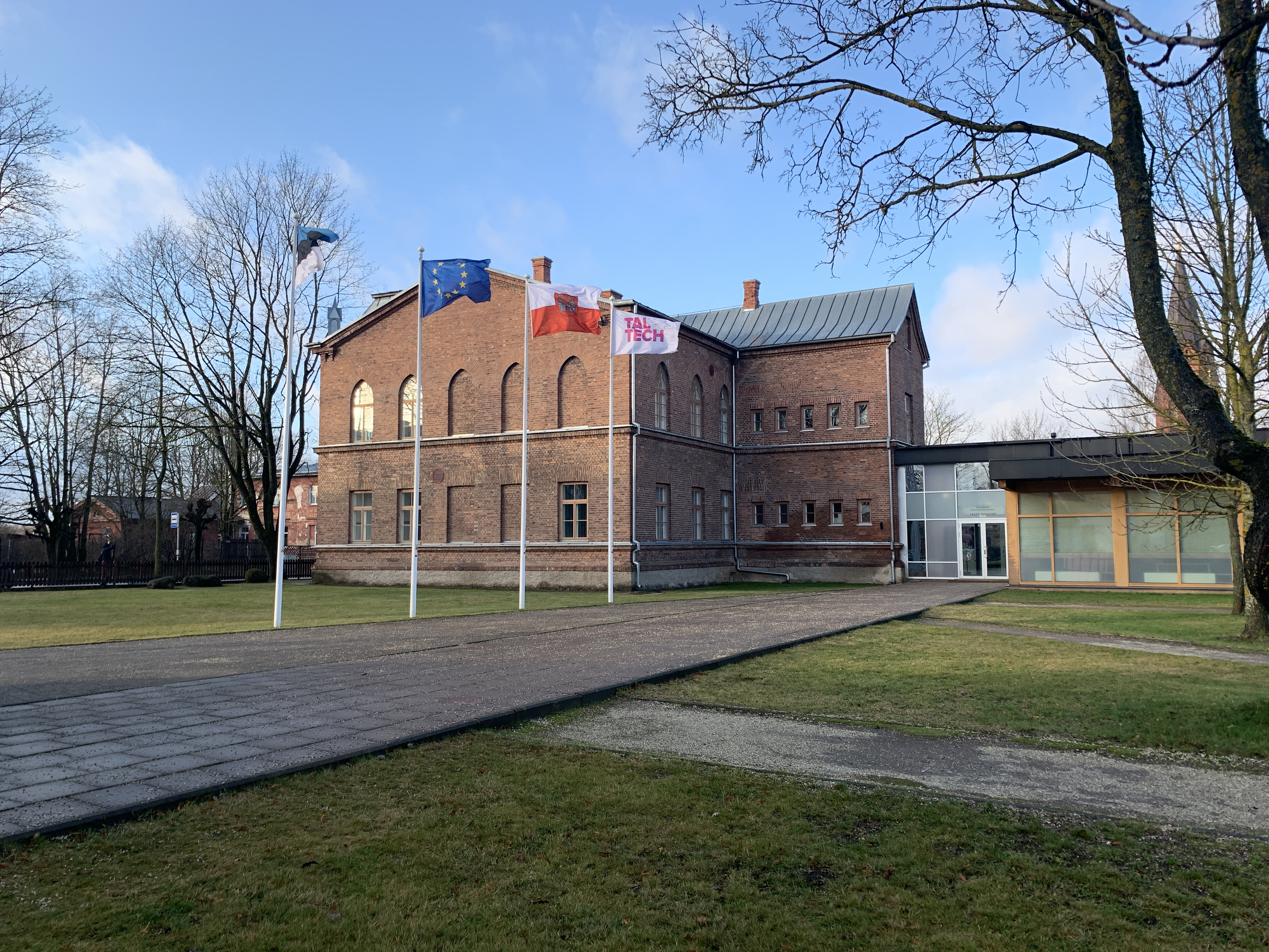 Tartu kolledži peahoone